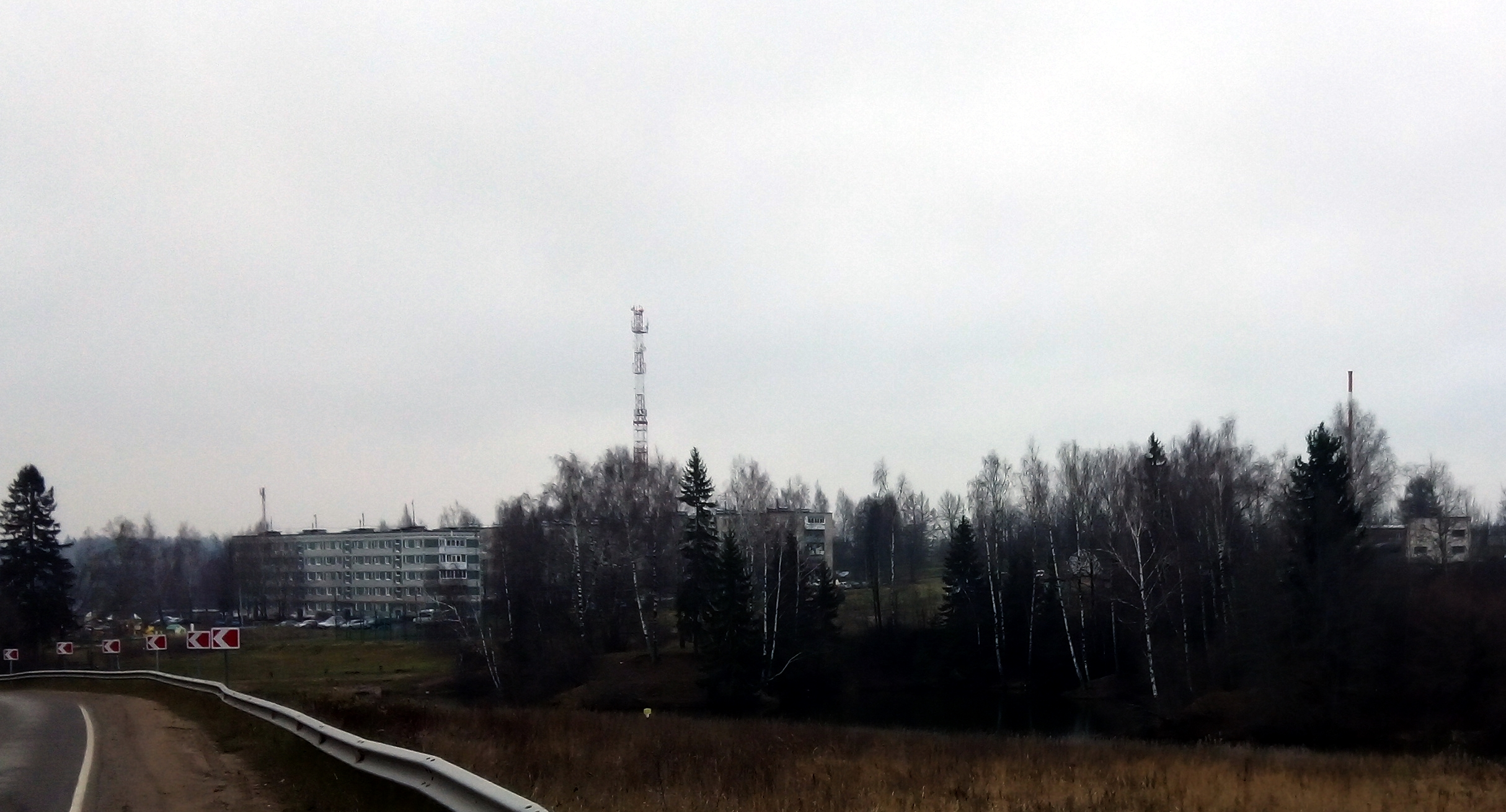 Каменка.Ноябрь 2019.